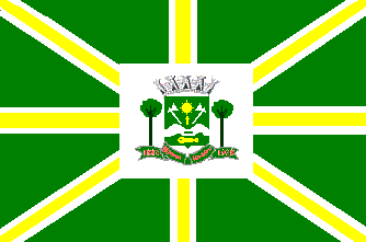 Bandeira do município de Benjamin Constant, Amazonas, Brasil.